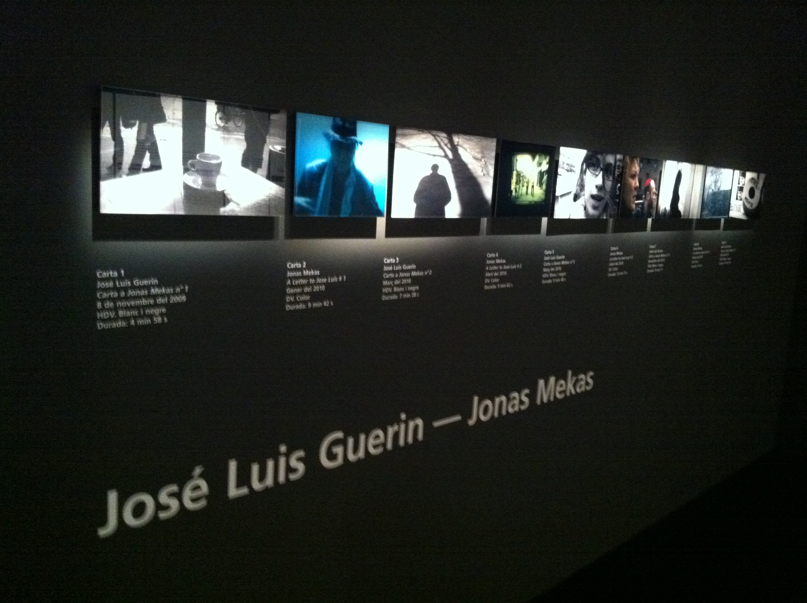 Totes les cartes- cccb 2011